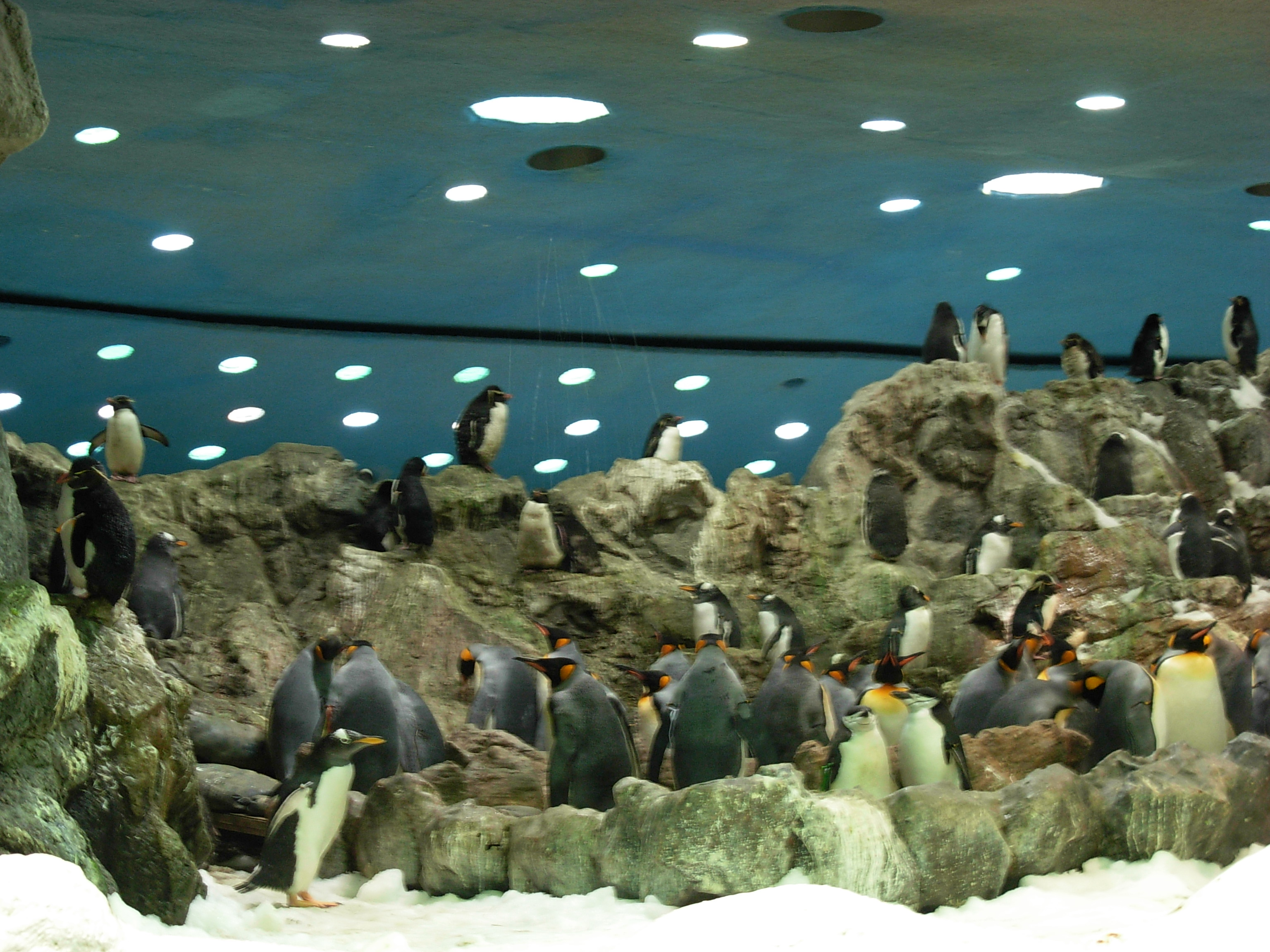 Penguins.